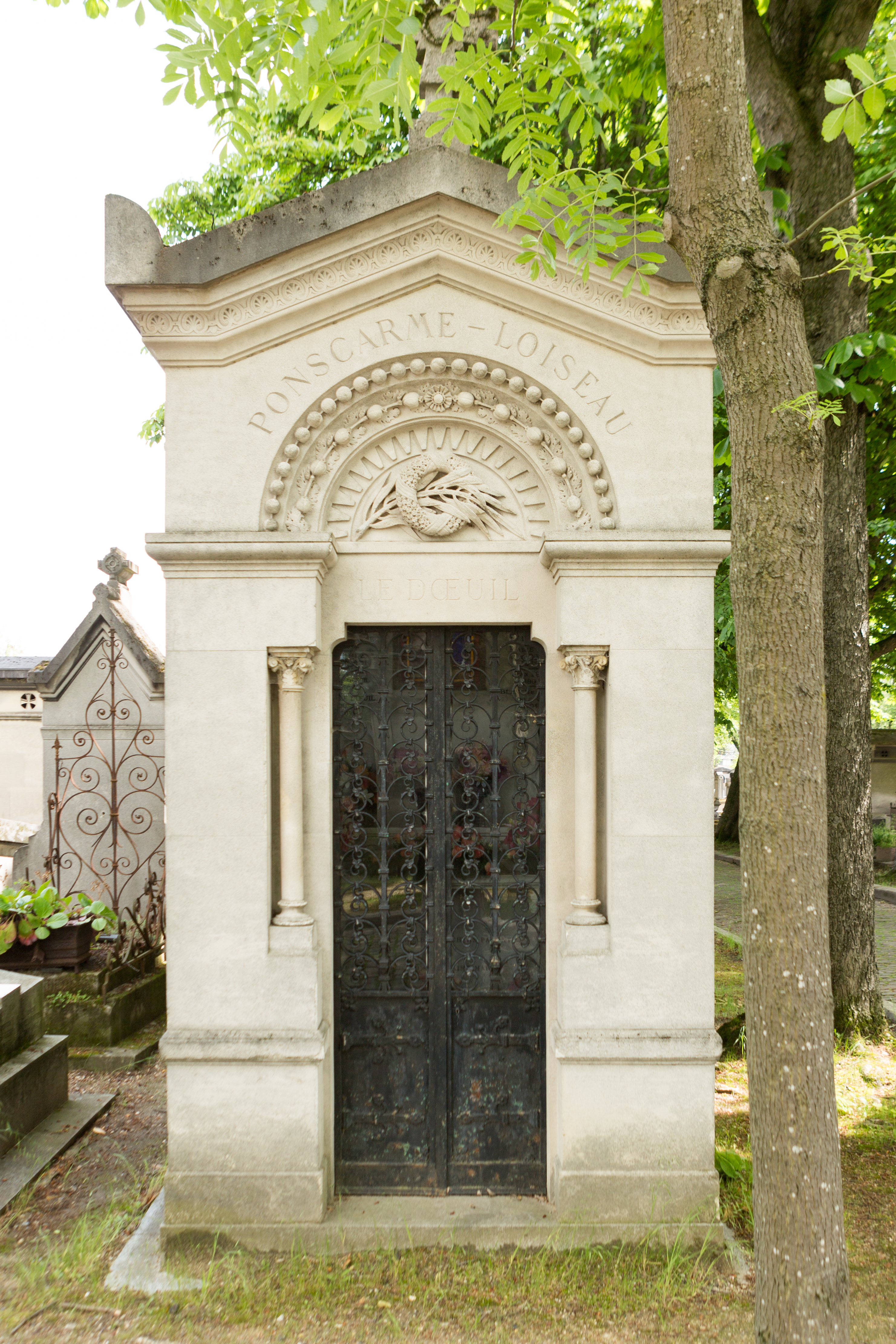 Sépulture de Léon Ponscarme (1879-1916), cycliste et téléphoniste mort pour la France durant la première guerre mondiale.